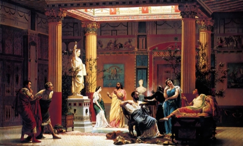 Répétition du joueur de flûte et de la femme de Diomède chez le prince Napoléon dans l'atrium de sa maison pompéienne, 1860, musée national du château de Versailles.